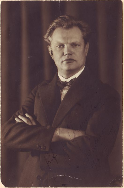 Juozas Gruodis (1884 m. gruodžio 20 d. Rokėnuose, Dusetų valsčius – 1948 m. balandžio 16 d. Kaune) – Lietuvos kompozitorius, dirigentas, pedagogas, profesorius.